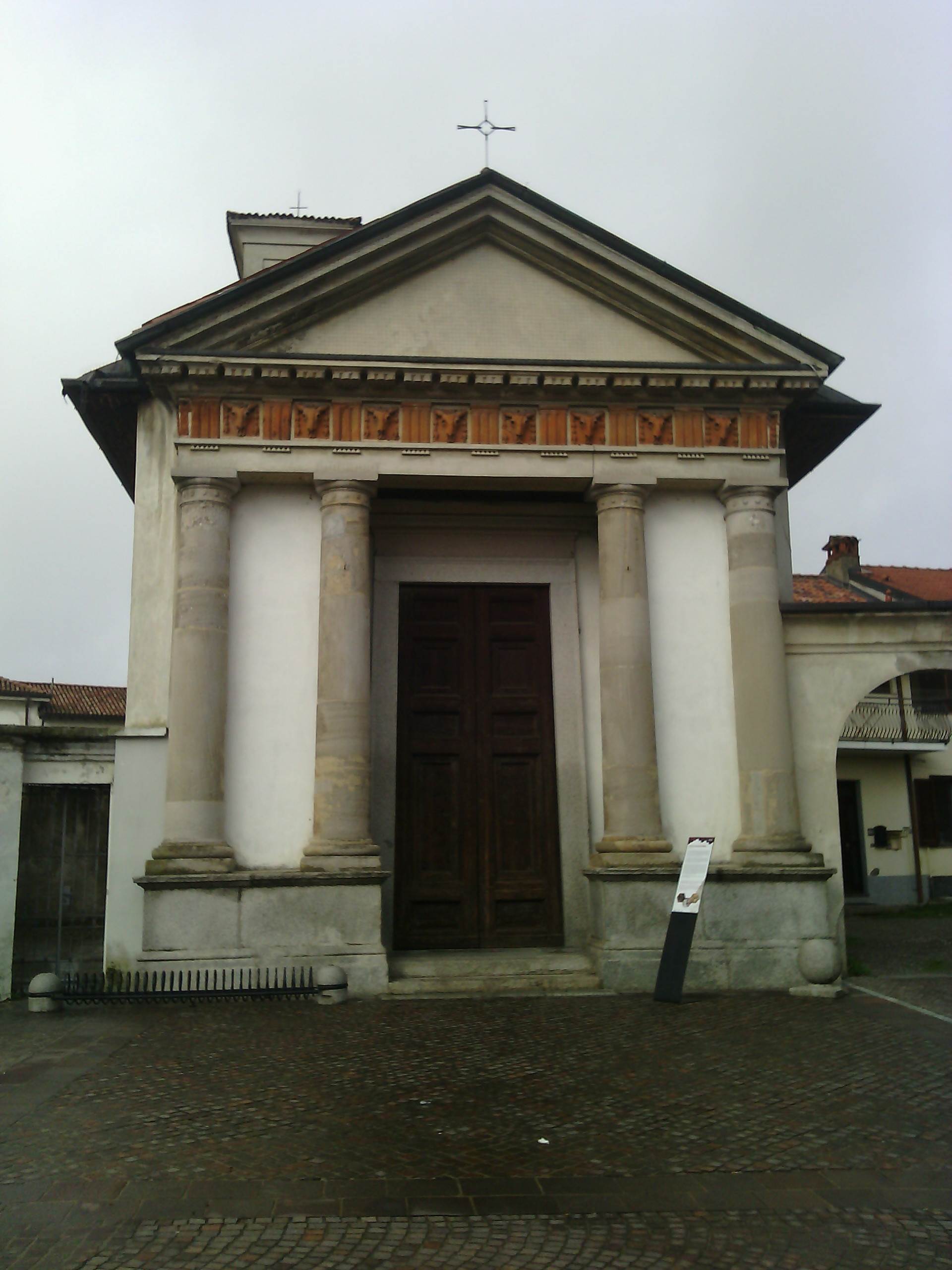 Chiesa parrocchiale di San Bartolomeo a Ossona (MI) - facciata